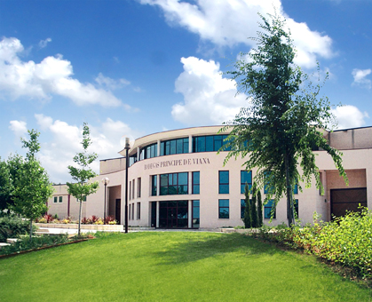 Sede de Bodegas Príncipe de Viana en Navarra